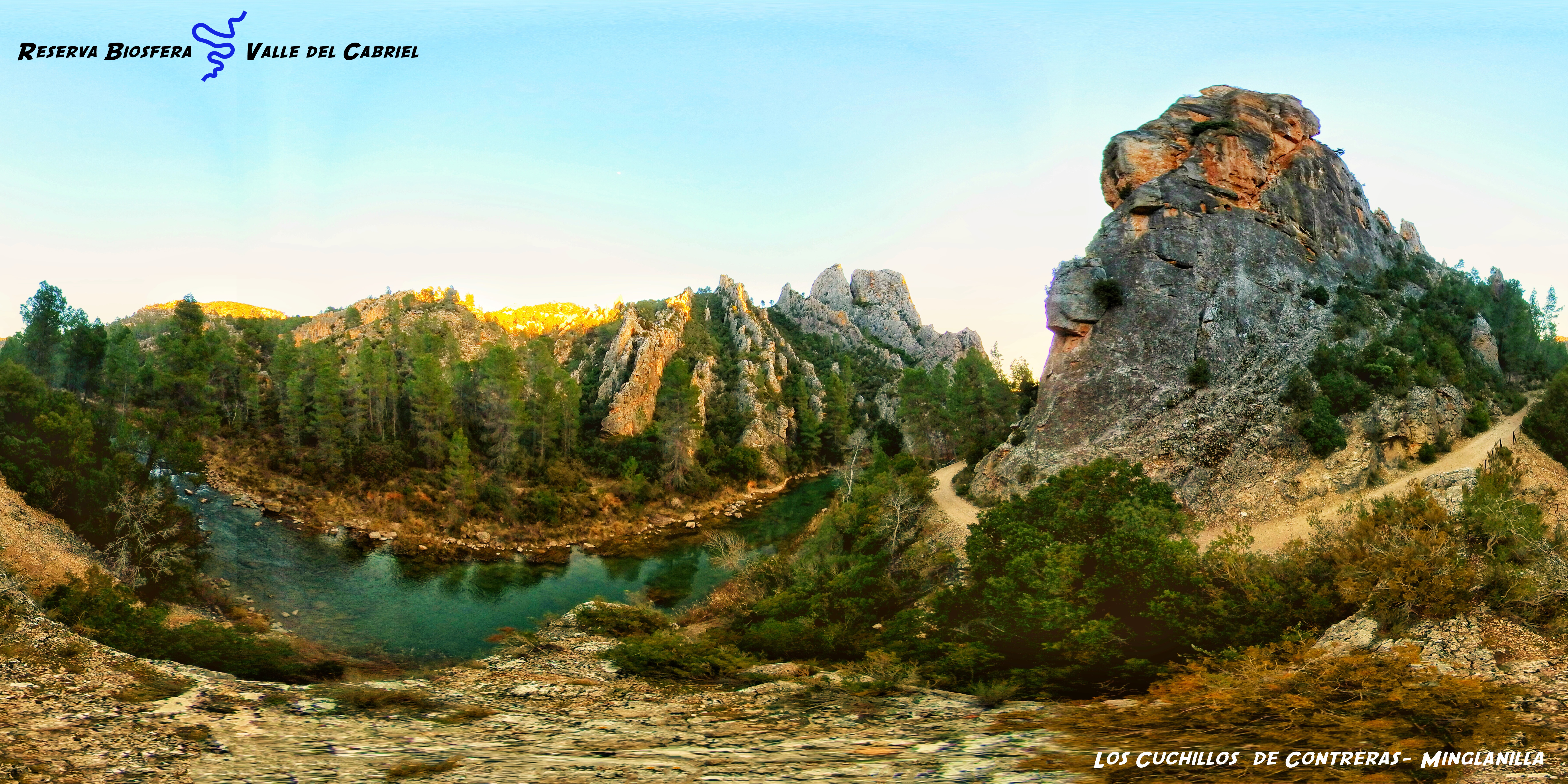 Vistas del parque y de la carretera de acceso